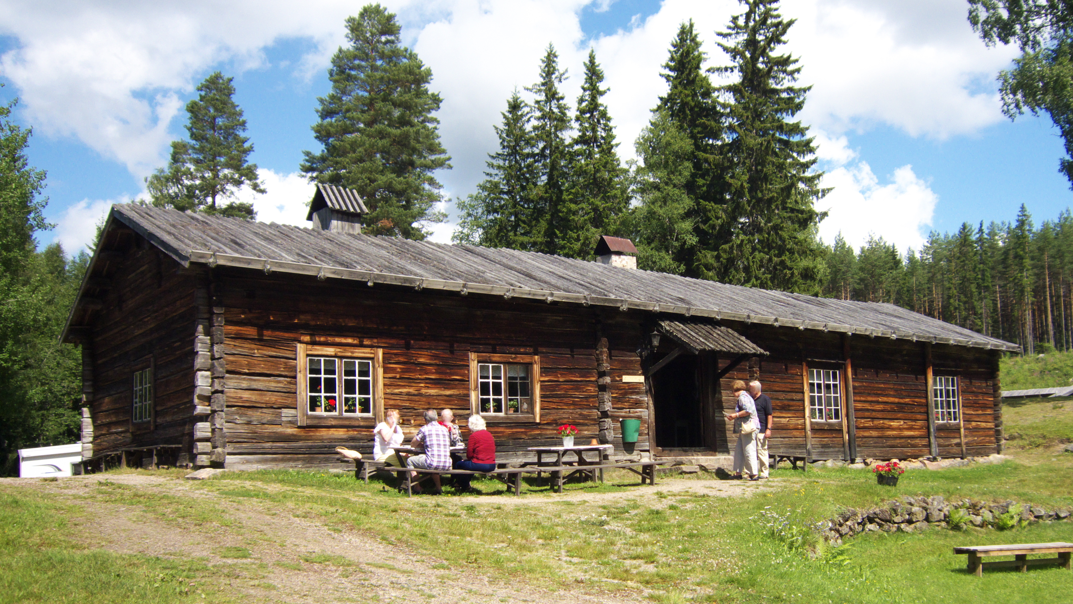 Hembygdsgården Karmenkynna i Lekvattnet. Mangårdsbyggnaden, med rökstugan från Örtjärnshöjden närmast.